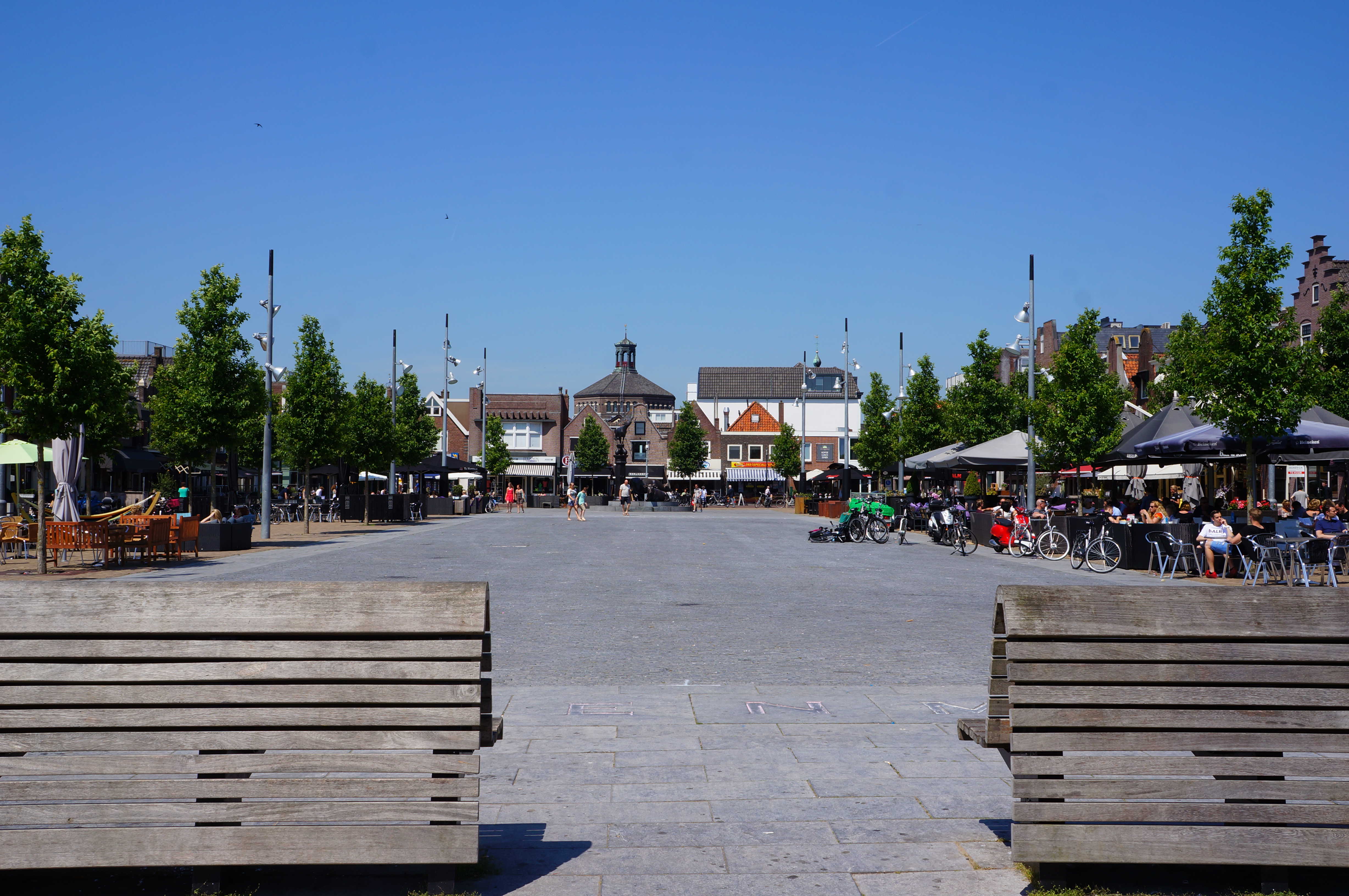 De Koemarkt in Purmerend op een zomerse middag in juli.